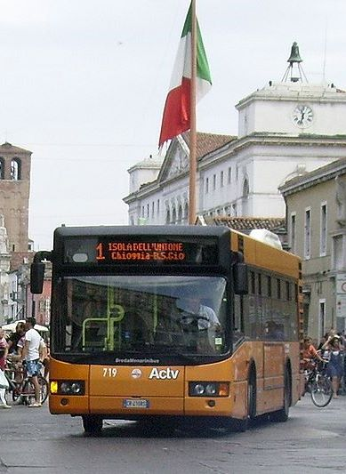 Un autobus urbano nel centro storico di Chioggia